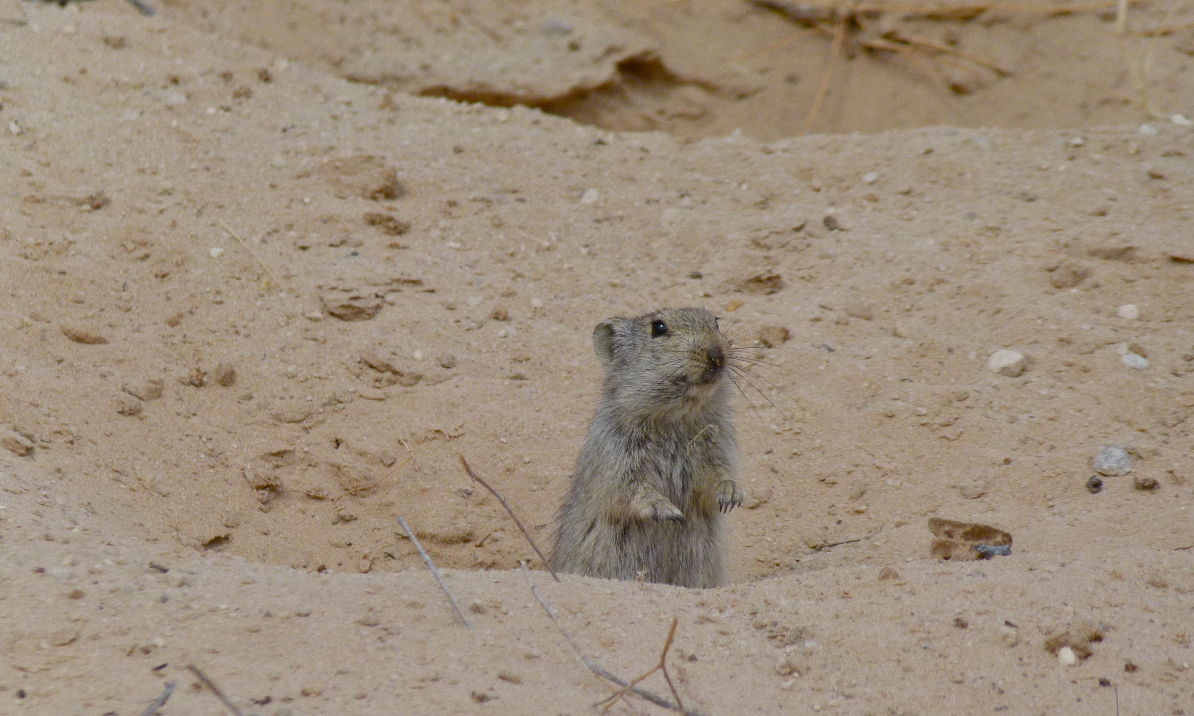 Nossob Riverbed,Kgalagadi Transfrontier Park, SOUTH AFRICA